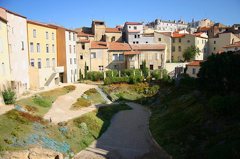 Arènes romaines de Béziers.